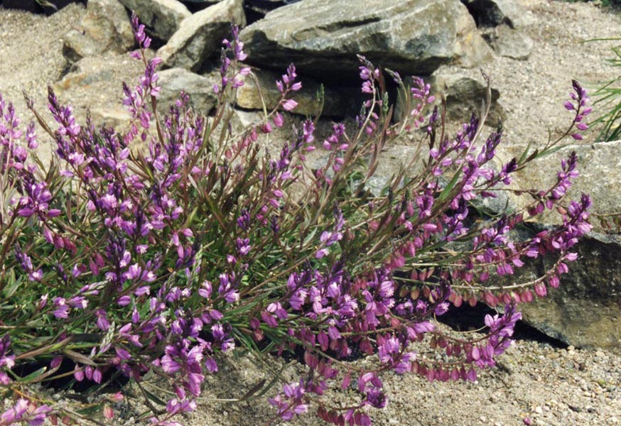 Polygala vulgaris